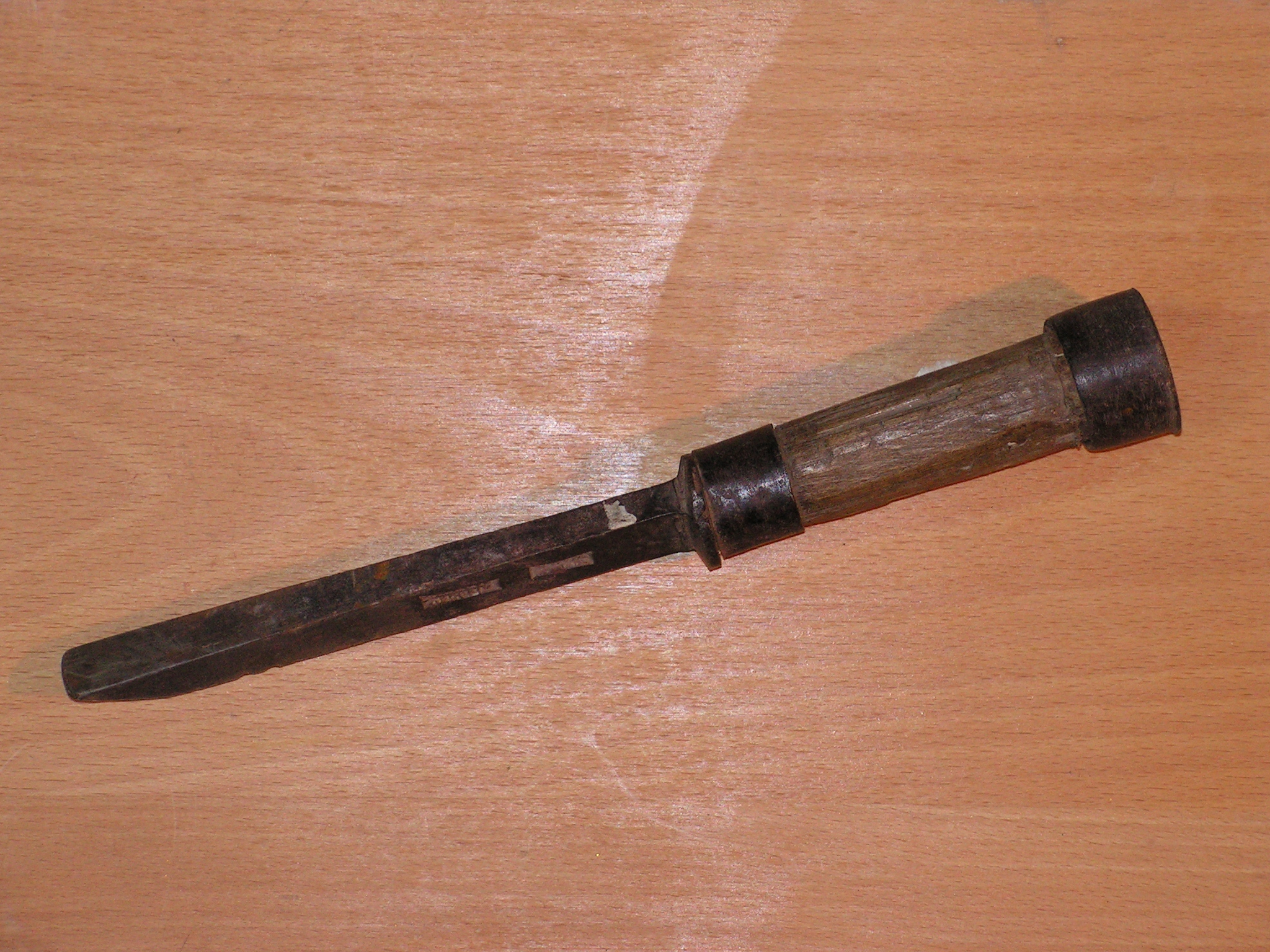 Zdjęcie przedstawia dłuto - przysiek, do wykonywania gniazd w połączeniach czopowych.